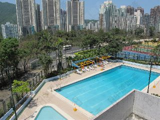 中文（香港）: 康盛花園游泳池